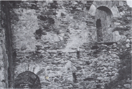 Padiglione interno di ponente del Castello di Pont-Saint-Martin detto Castellaccio, Pont-Saint-Martin, Valle d'Aosta, Italia.